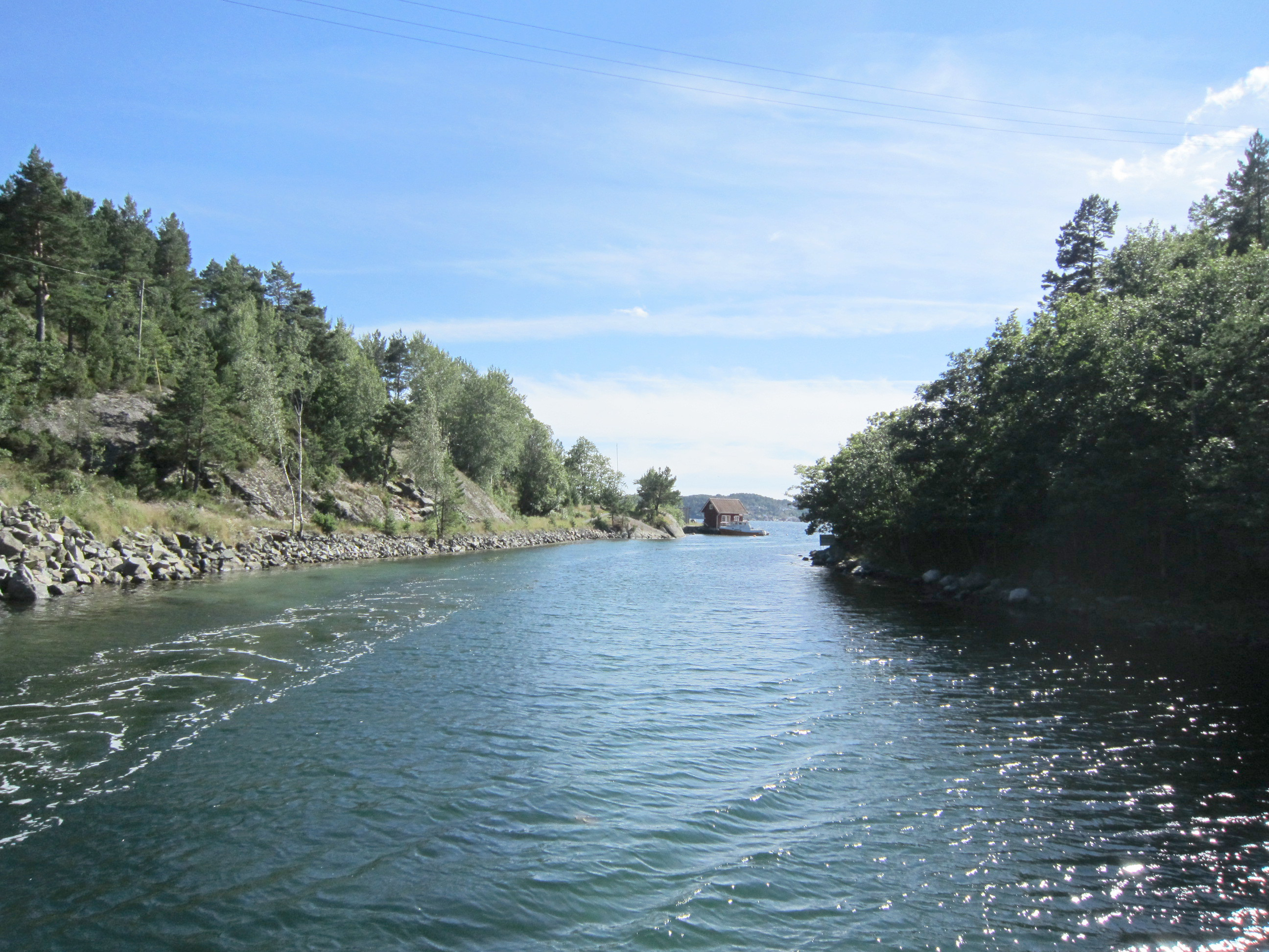 Hødnebøkilen ved Øysang, på nordsiden av Søndeledsfjorden